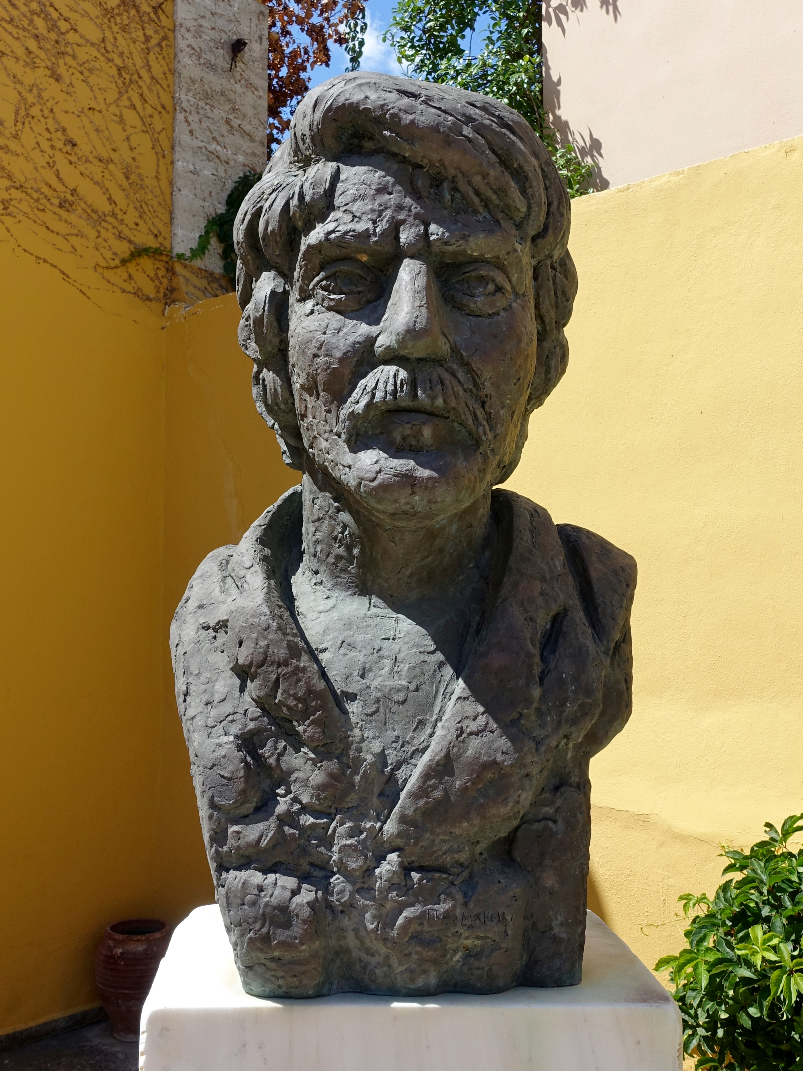 Denkmal für Giannis Sakellarakis am Archäologischen Museum Archanes, Kreta, Griechenland